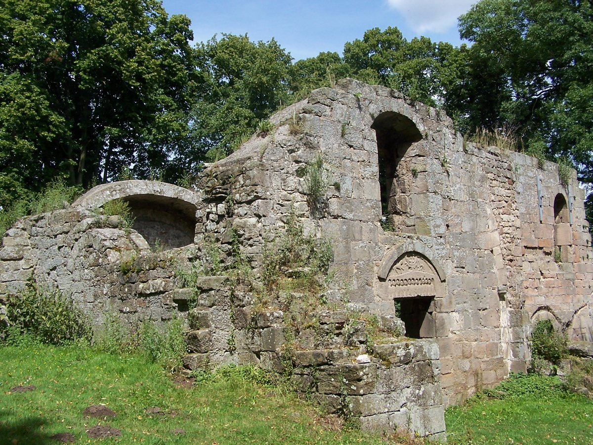 Alt-Rhoden. Kirchenruine